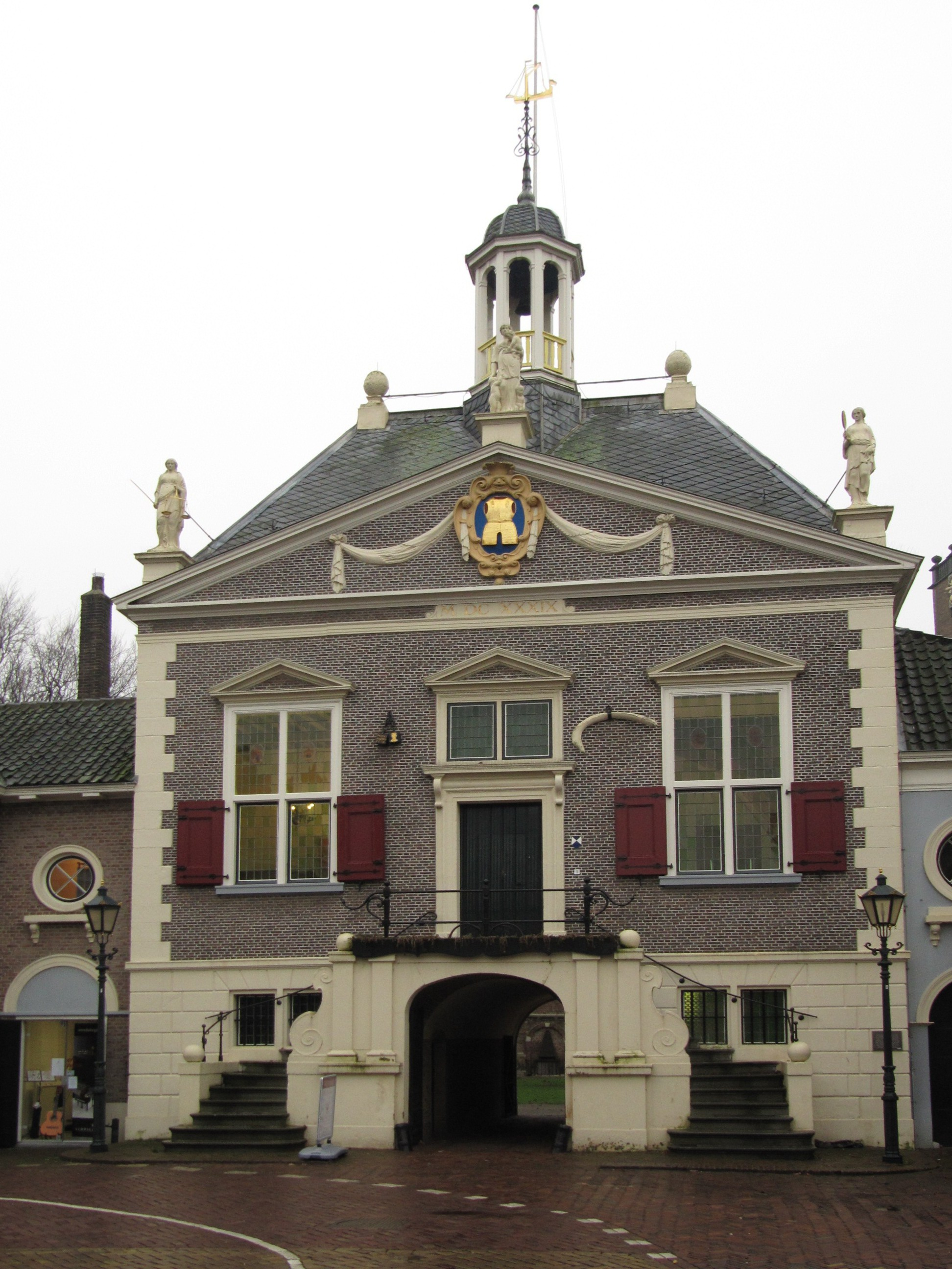 RM29748 Middelharnis - Raadhuisstraat 1.jpg